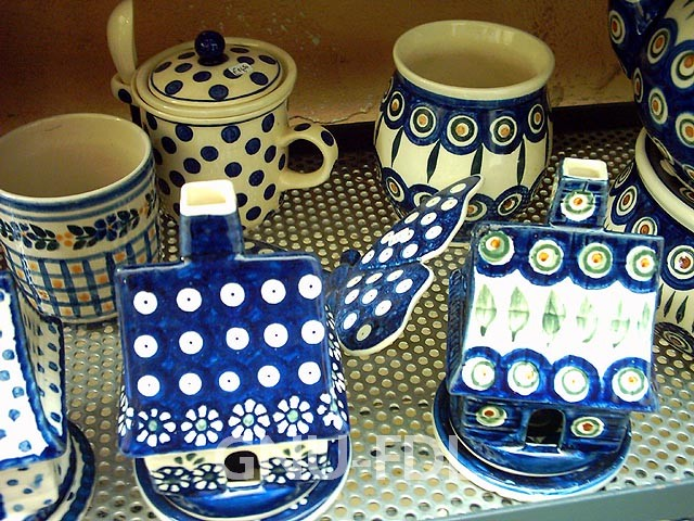 Bunzlauer Keramik mit typischen Mustern. Neuere polnische Fertigung.